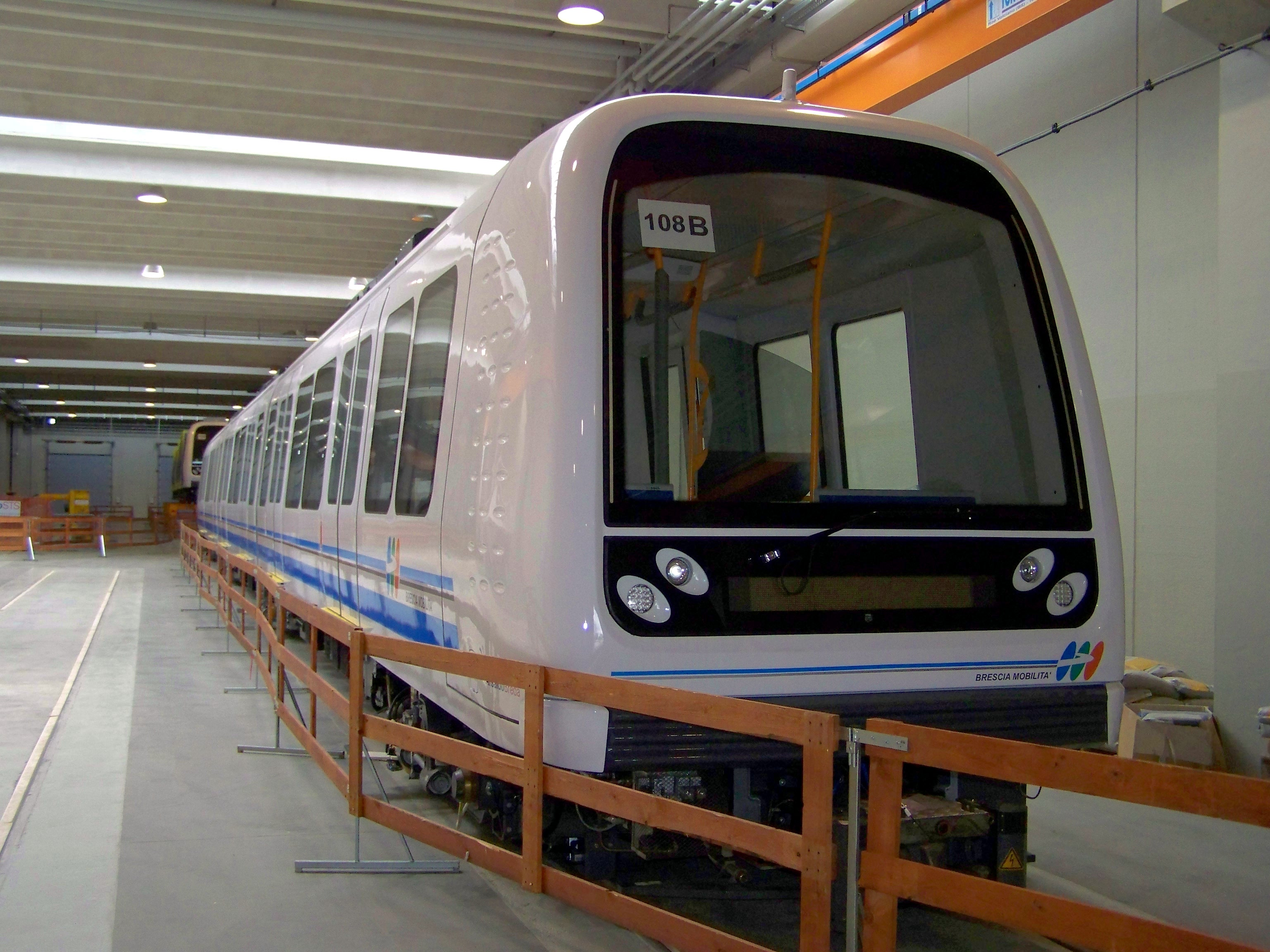 L'esterno dell'unità 108 del Metro.bs di Brescia Mobilità. Sullo sfondo l'unita' 105.